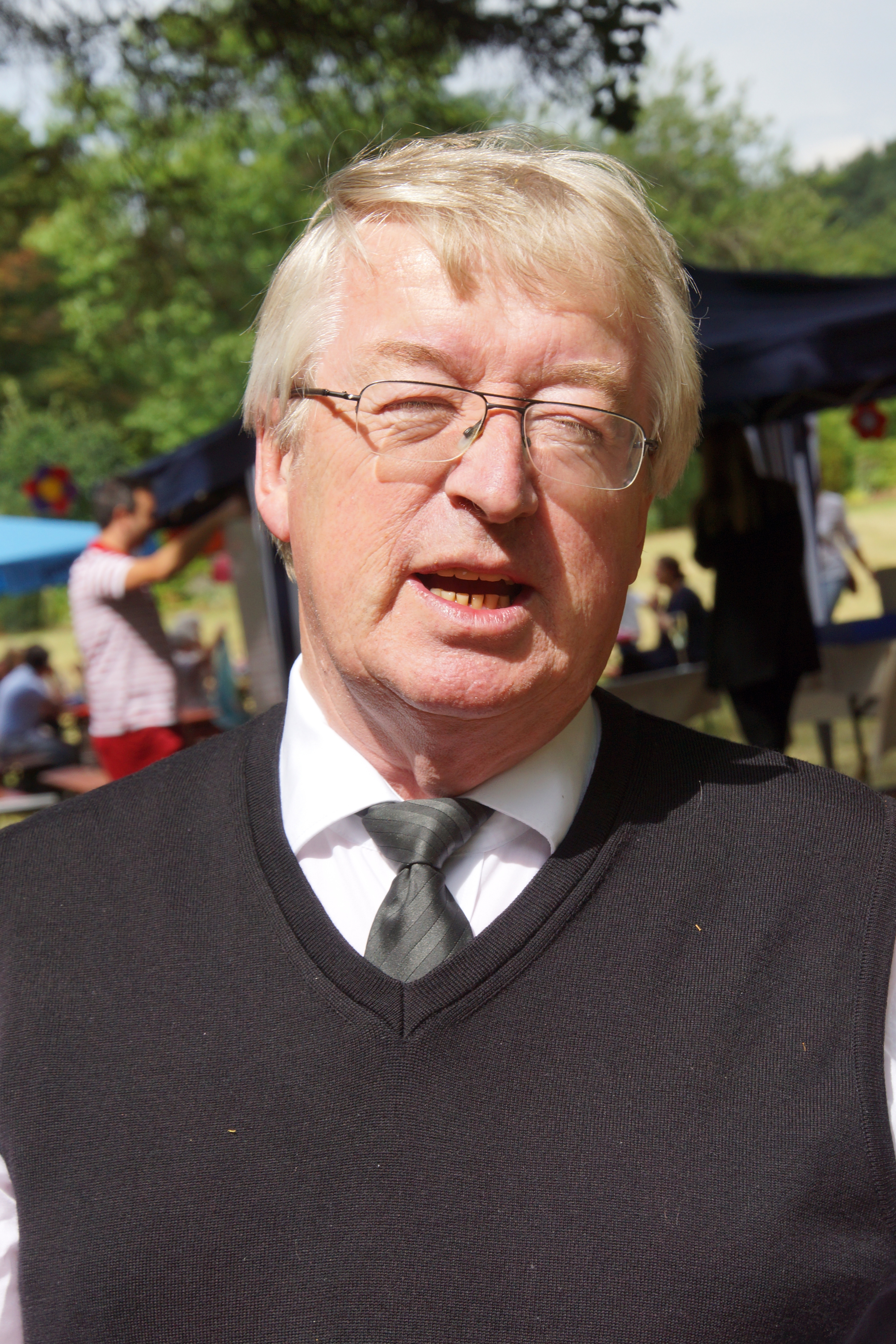 Monignore Richard Distler